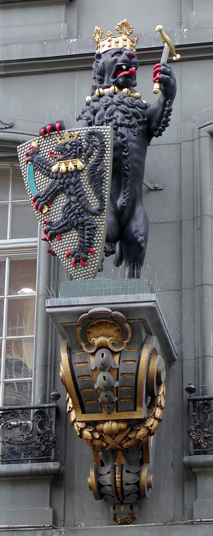 Der schwarze Löwe das Wappentier der Berner Zunftgesellschaft zu Obergerwern an der Marktgasse zu Bern.